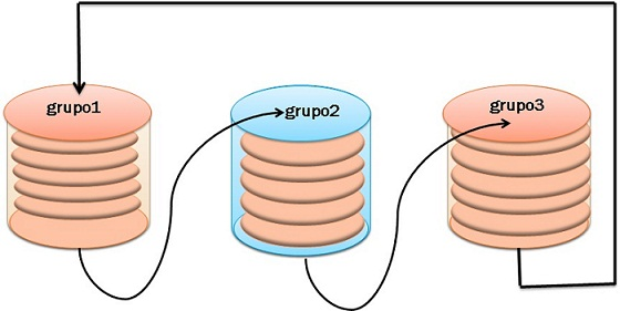 Esta imagen muestra el manejo cíclico de los Archivos Redo Log.